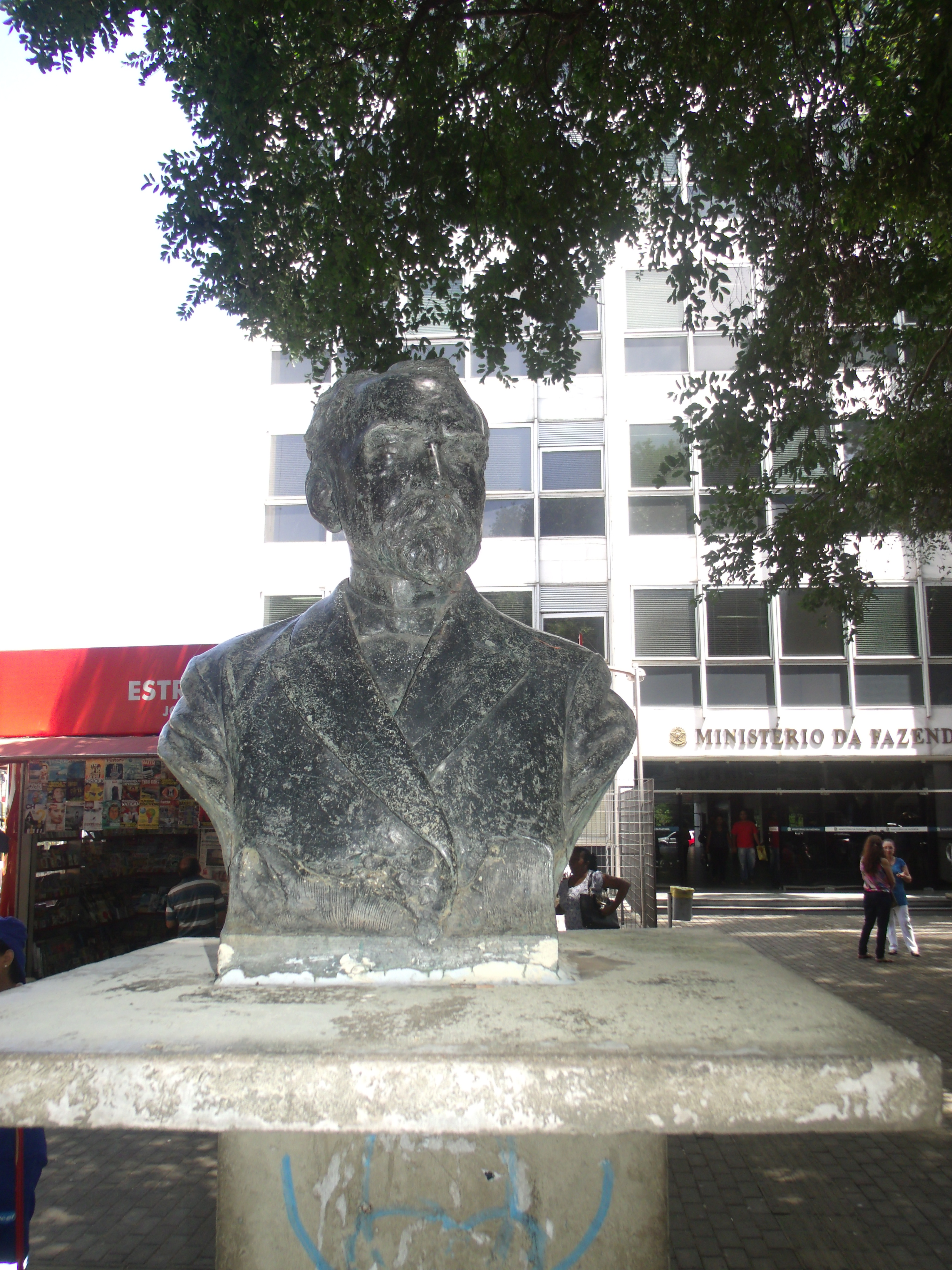 Busto atribuído ao conselheiro Antonio Coelho Rodrigues, na praça Rio Branco, em Teresina.